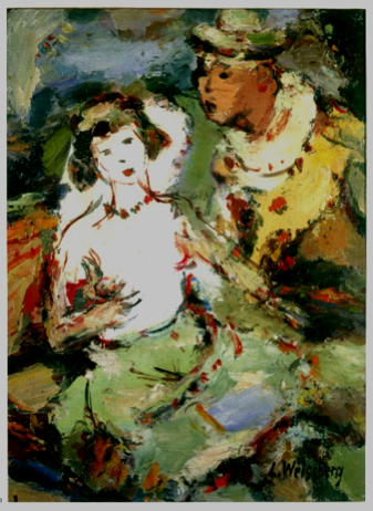 Tableau Clown séducteur et fille au linge blanc, de Léon Weissberg